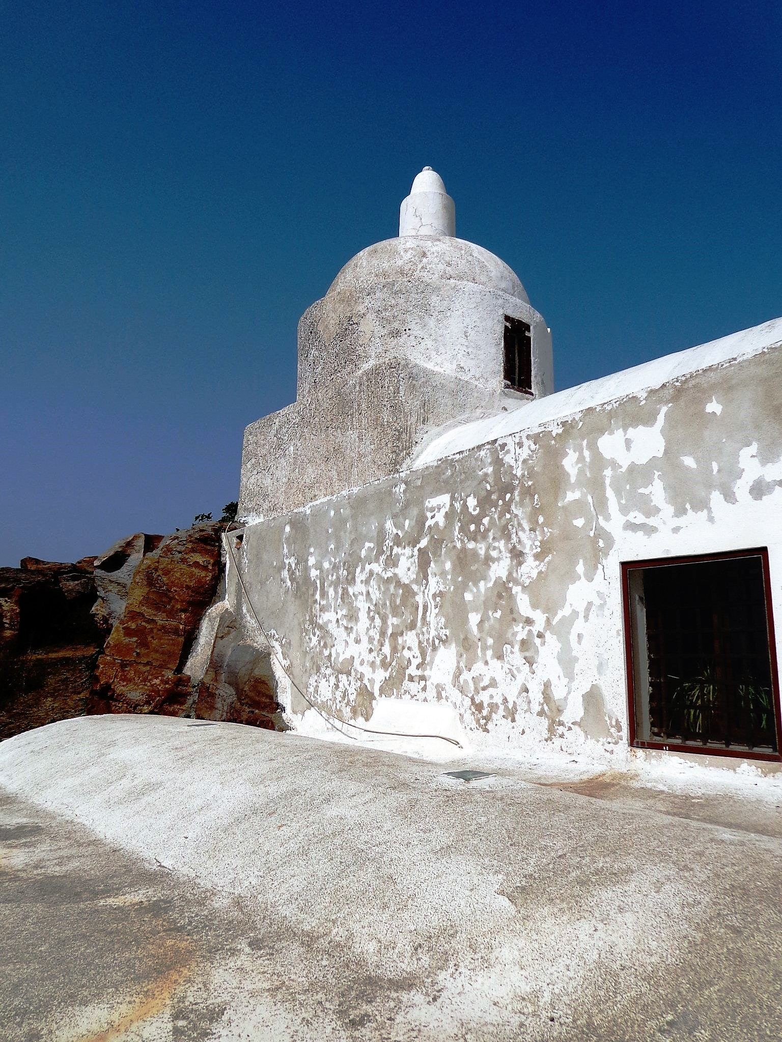 Cupola, Vista occidentale. Foto presente su pagine web personali e sul profilo FB.